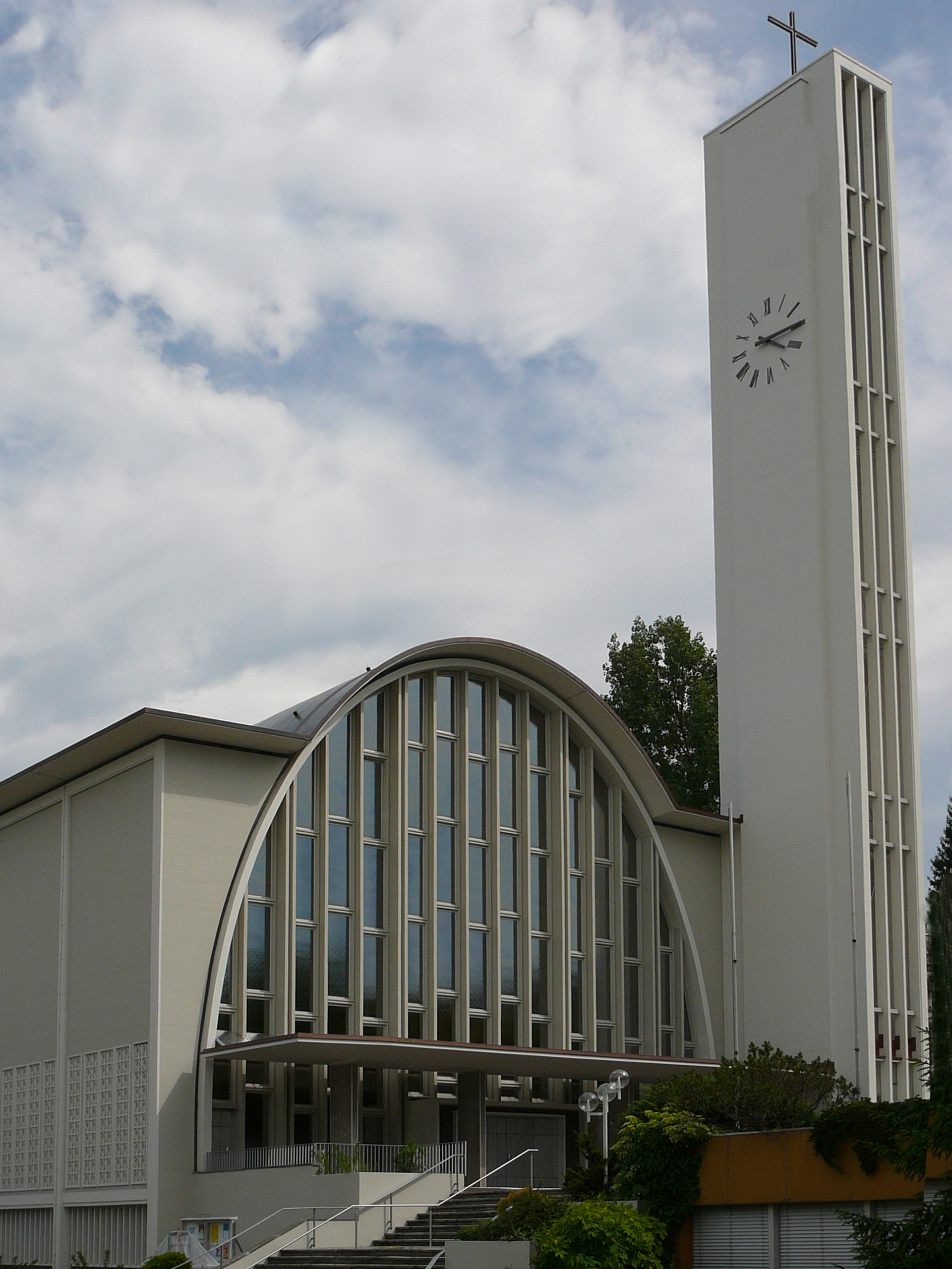 Römisch-katholische Pfarrkirche St. Gallus Zürich-Schwamendingen, Blick von der Dübendorfstrasse